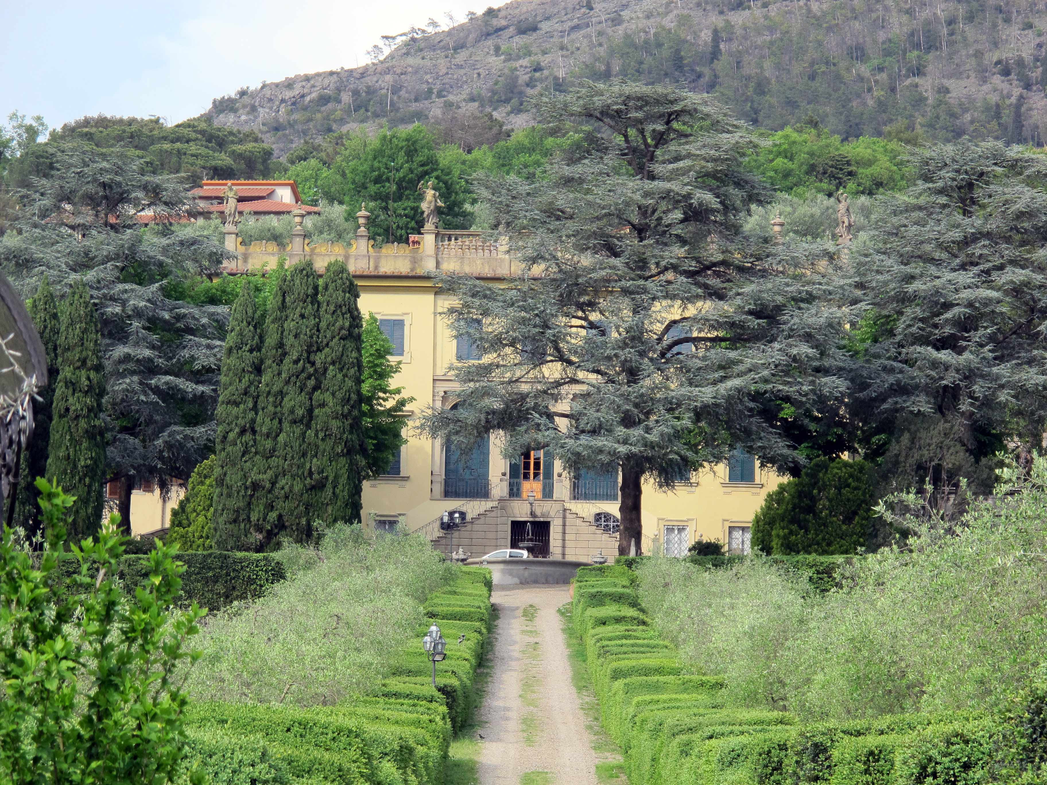 Montemurlo